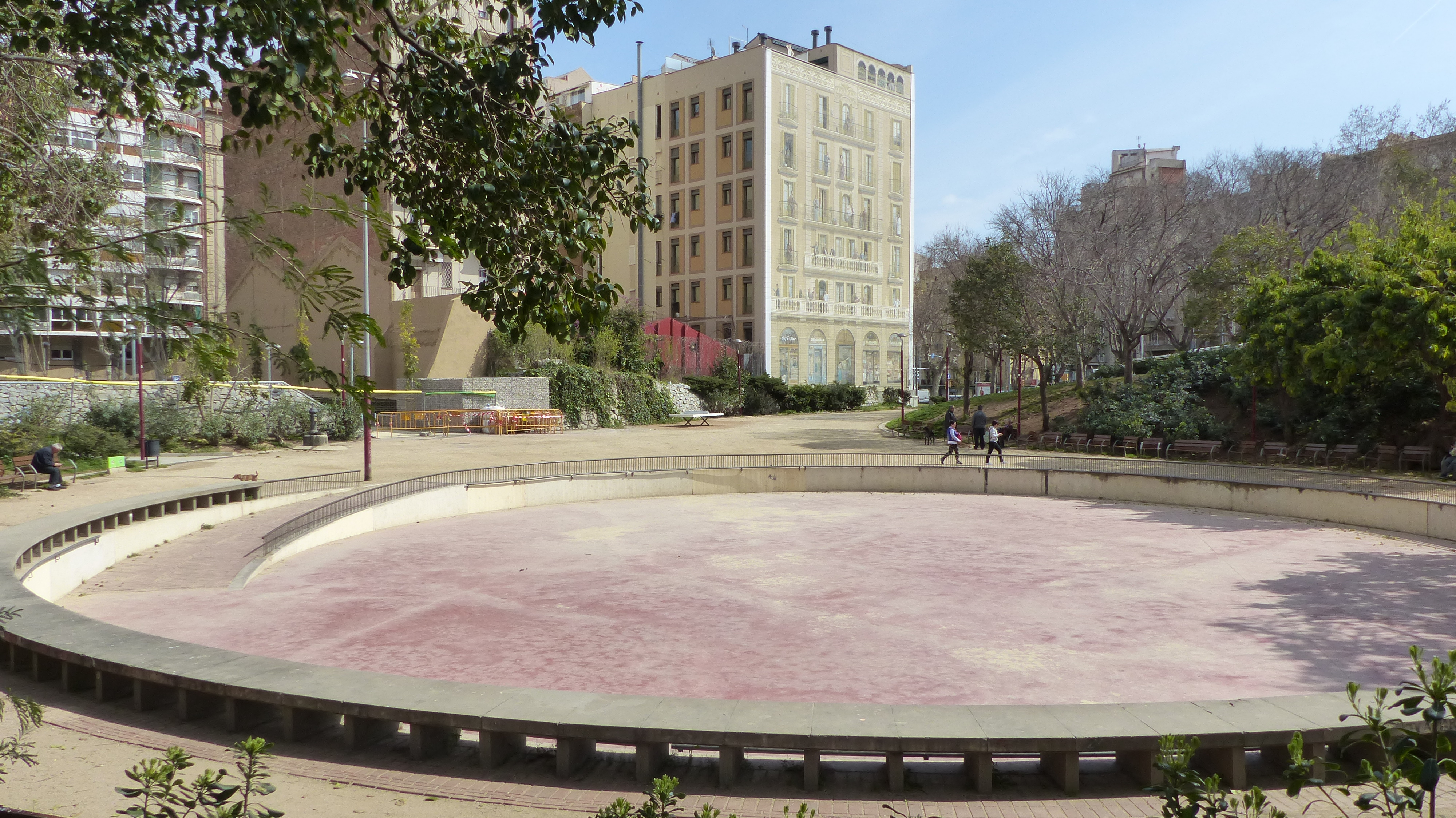 Plaza de Pablo Neruda de Barcelona, anteriormente Plaza de la Hispanidad.